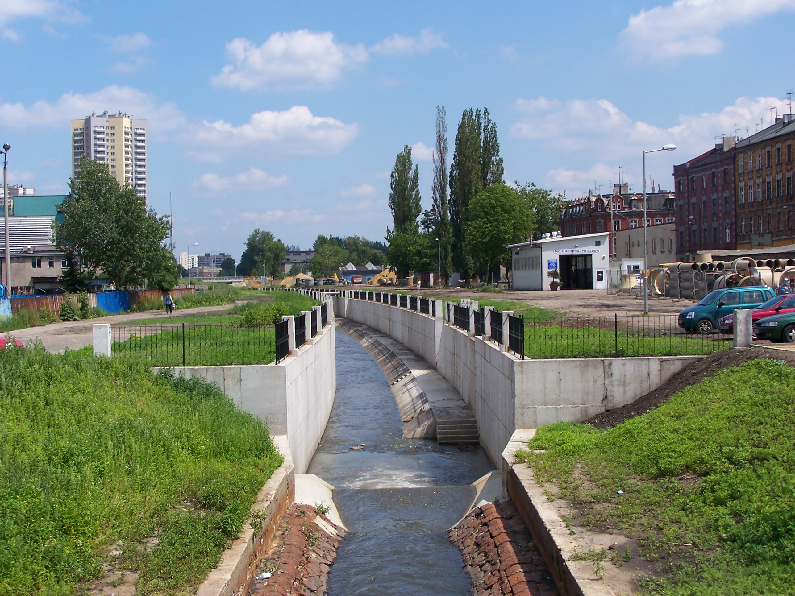 Rzeka Rawa przepływająca przez Katowice. Zdjęcie wykonano z mostu na ulicy Bankowej w Katowicach.